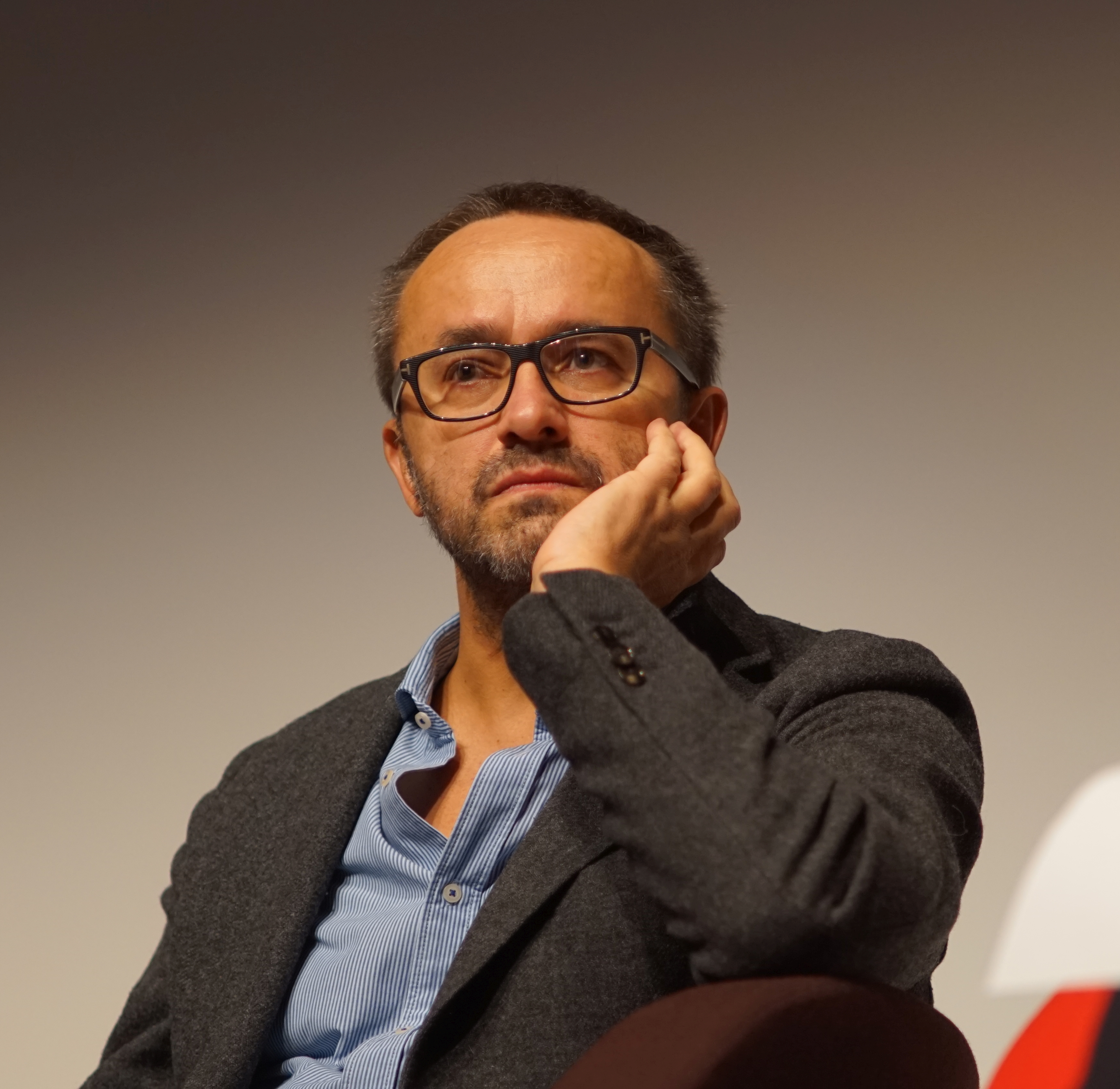 Andreï Zviaguintsev au festival de cinéma Premiers Plans d'Angers, en janvier 2016.